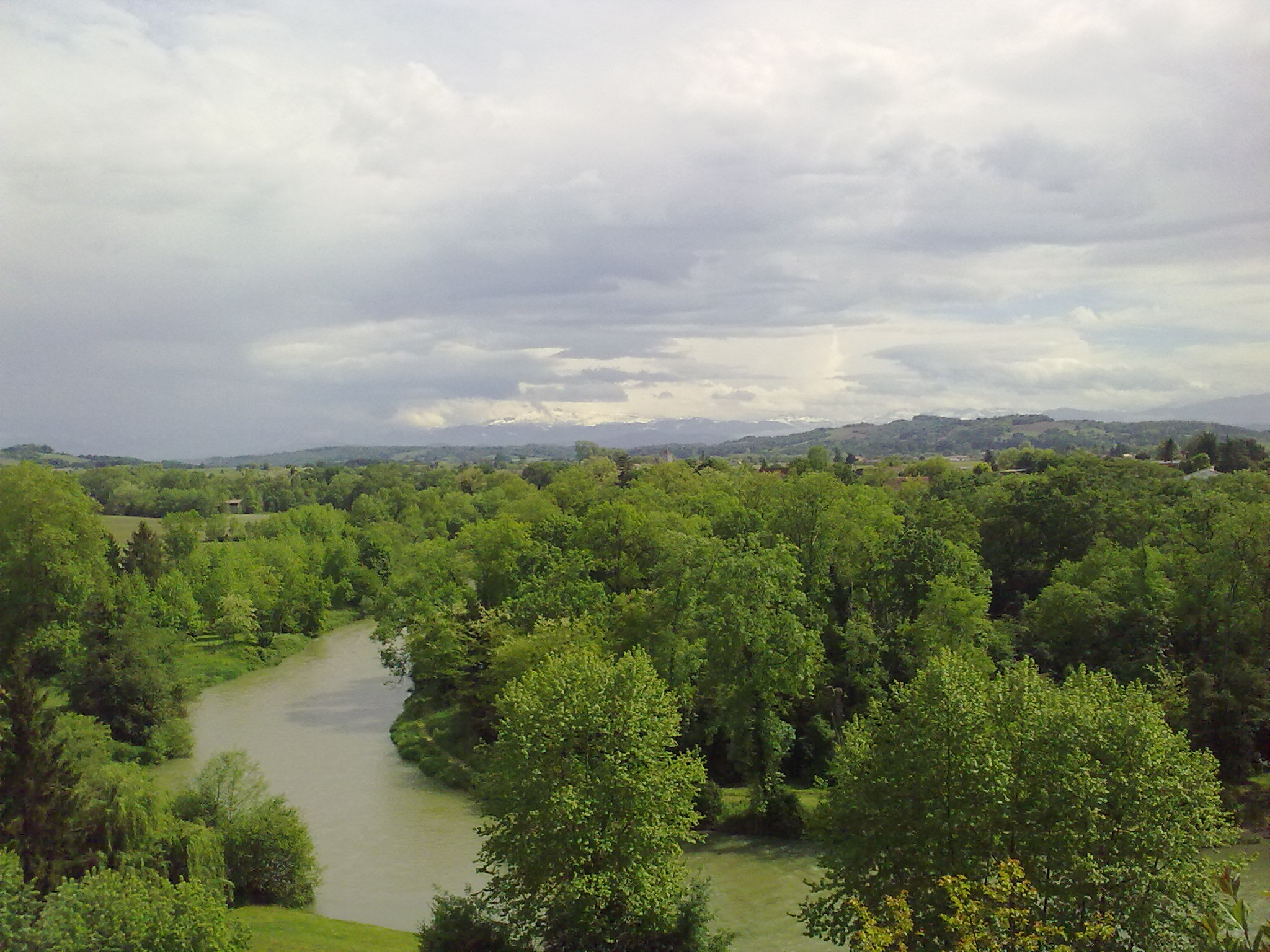 Sauveterre-de-Béarn, France